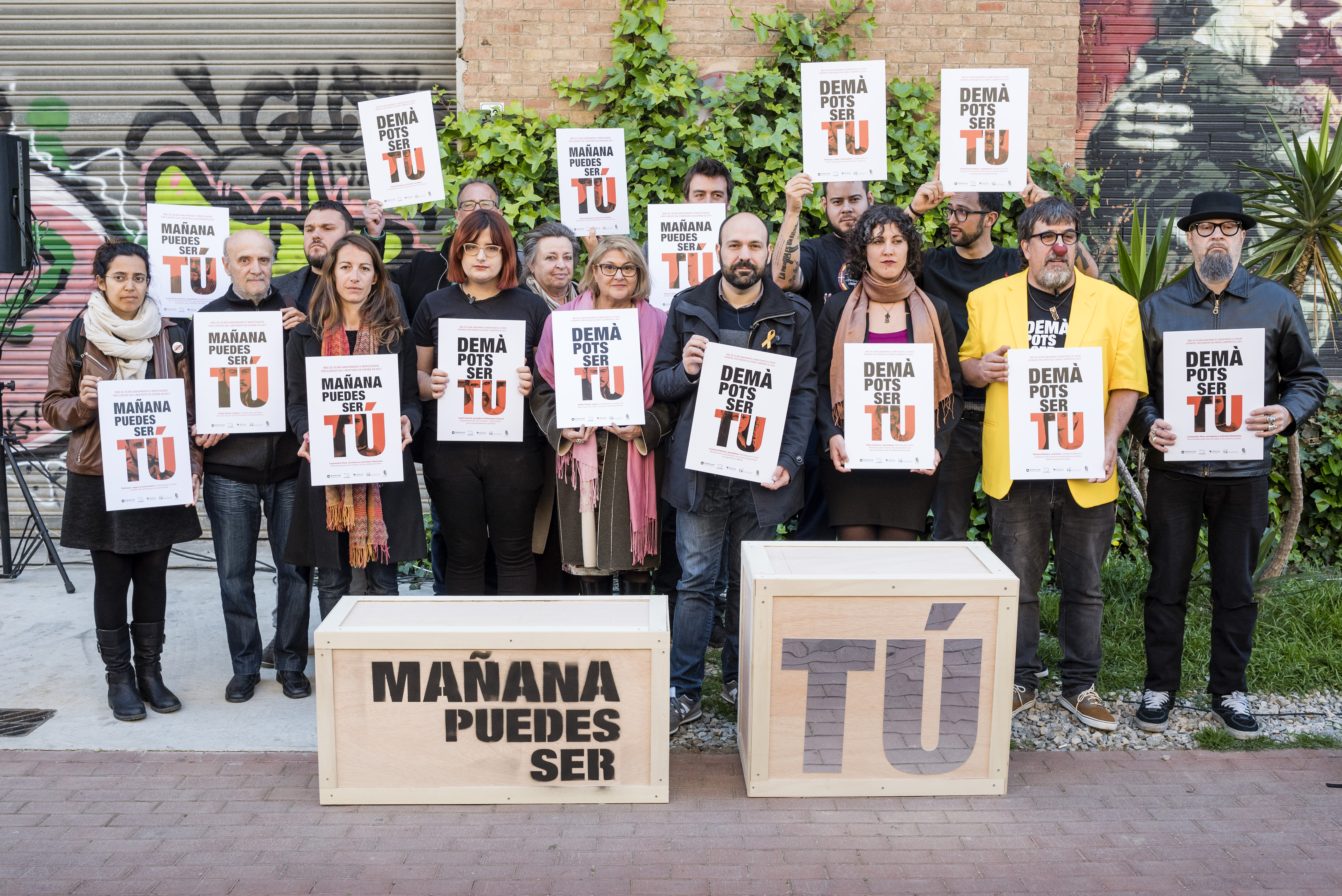 _DC71225